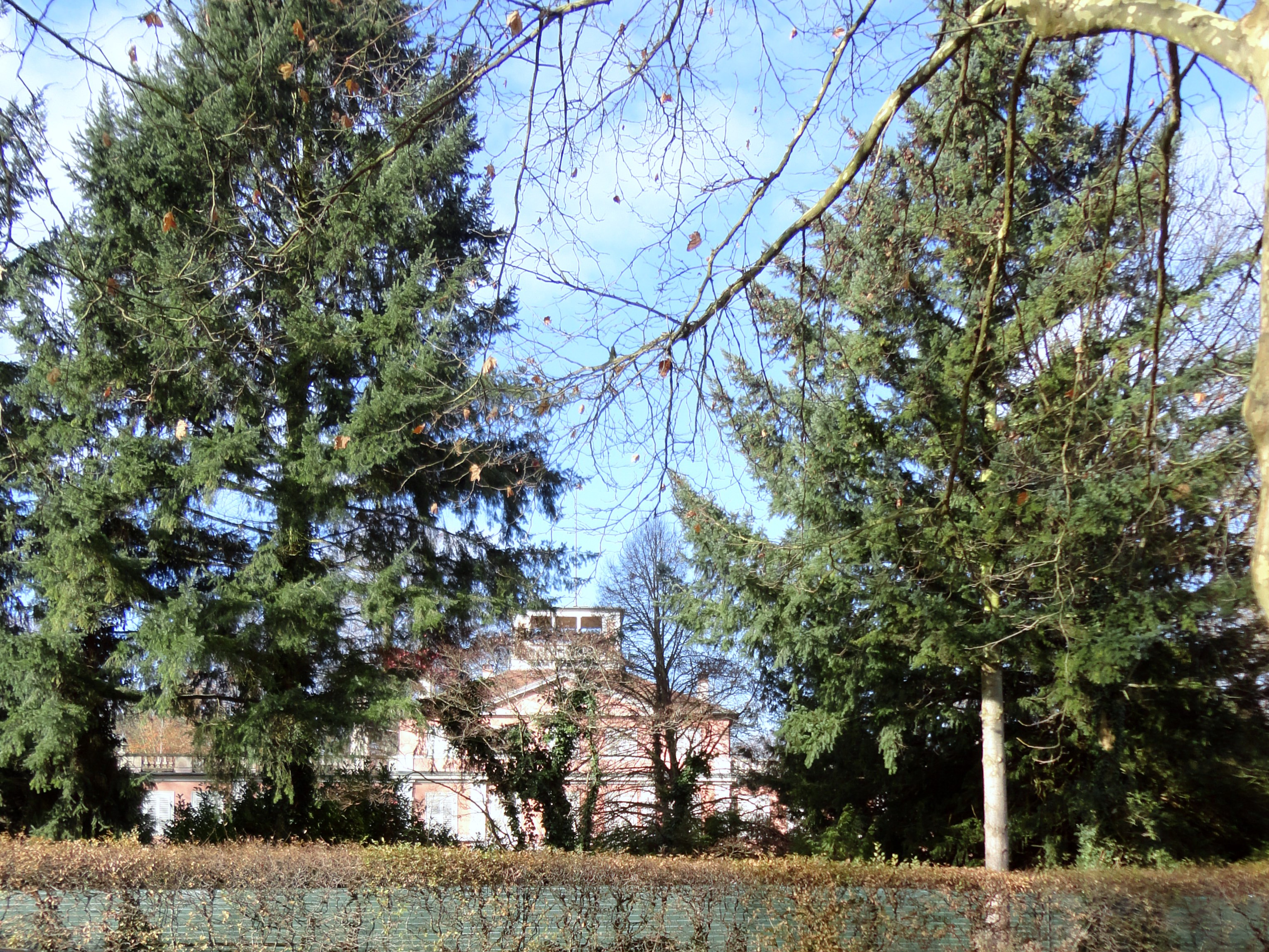 Altes Schloss im Schlosspark von Umkirch